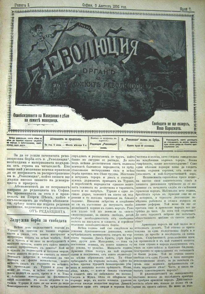 Вестник "Революция".